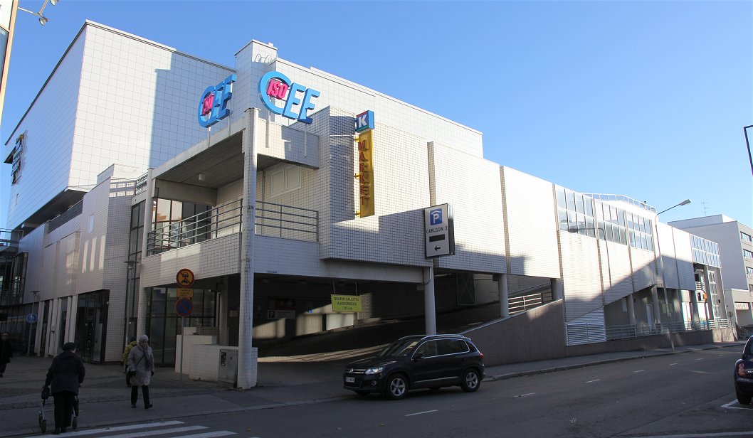 IsoCee Savonkadulta nähtynä. IsoCee on kauppa- ja viihdekeskus Kuopion torin läheisyydessä. IsoCee avattiin pe 17.5.2013. Kauppakeskuksen katuosoite on Ajurinkatu 16, ja rakennus on kauppatoria ympäröivässä Multimäen kaupunginosassa. Nimen IsoCee C viitannee kuopiolaiseen tavaratalo Carlsoniin, jonka pysäköintilaitoksista yksi sijaitsee IsoCeen Savonkadun puoleisella sivulla.